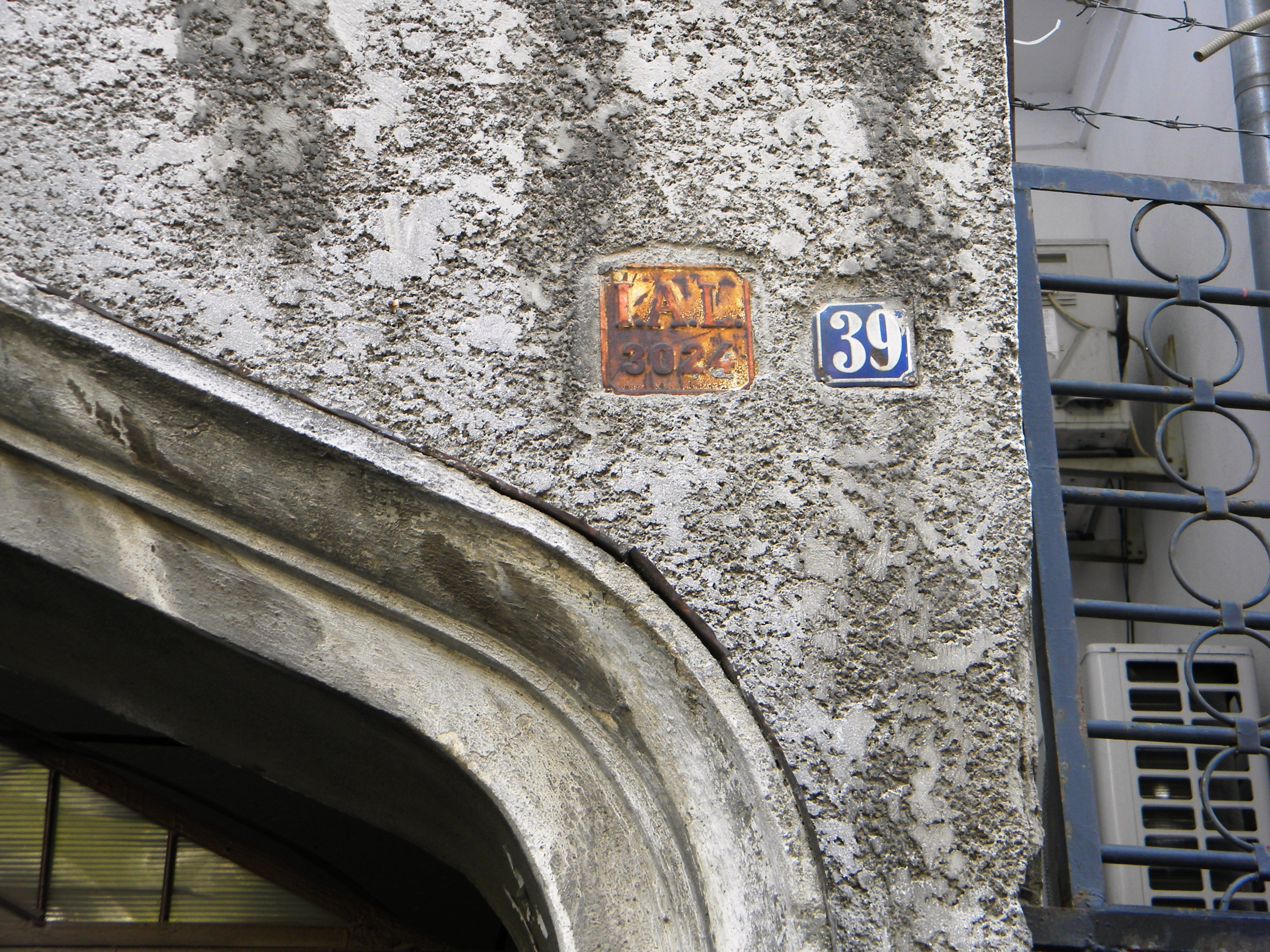 Bucuresti, Romania, Casa pe Calea Grivitei nr. 39, sect. 1 (detaliu